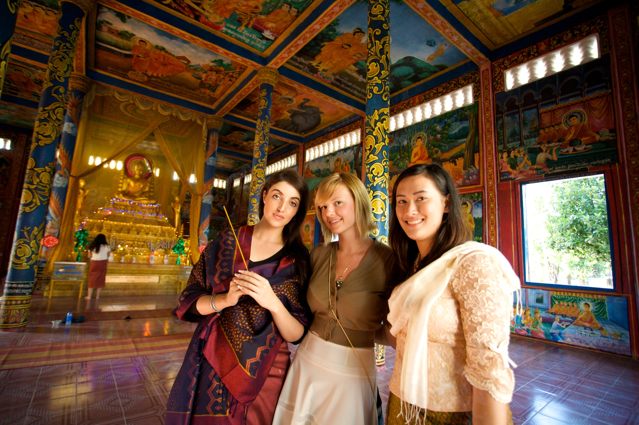 Mark J. Sebastian